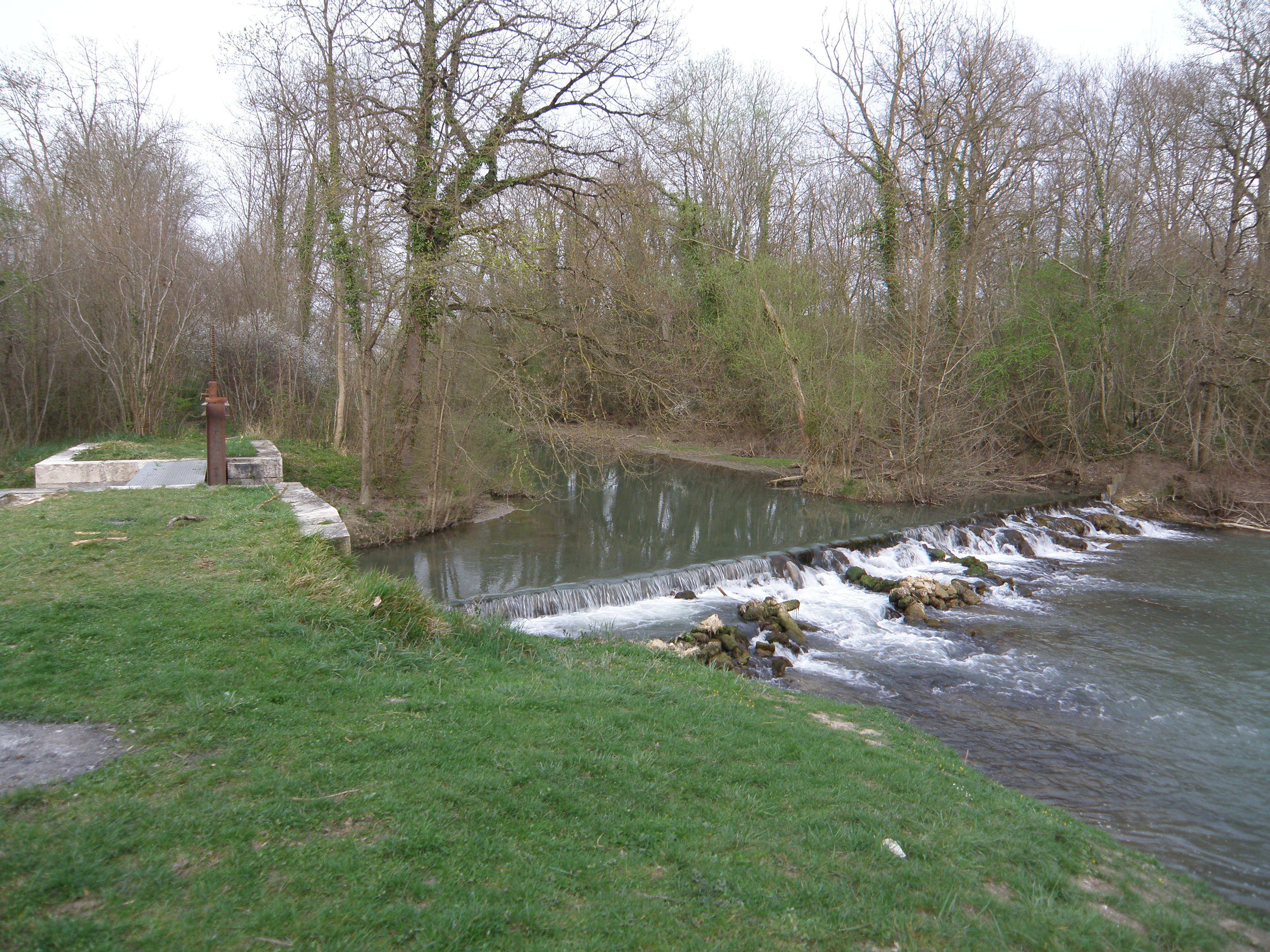 Barrage de prise d'eau du Melda, alimentant le canal de la Haute-Seine. 10170 Chauchigny.